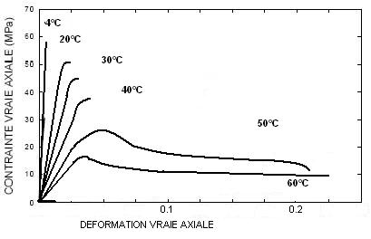 Courbe contrainte-déformation Effet de la température